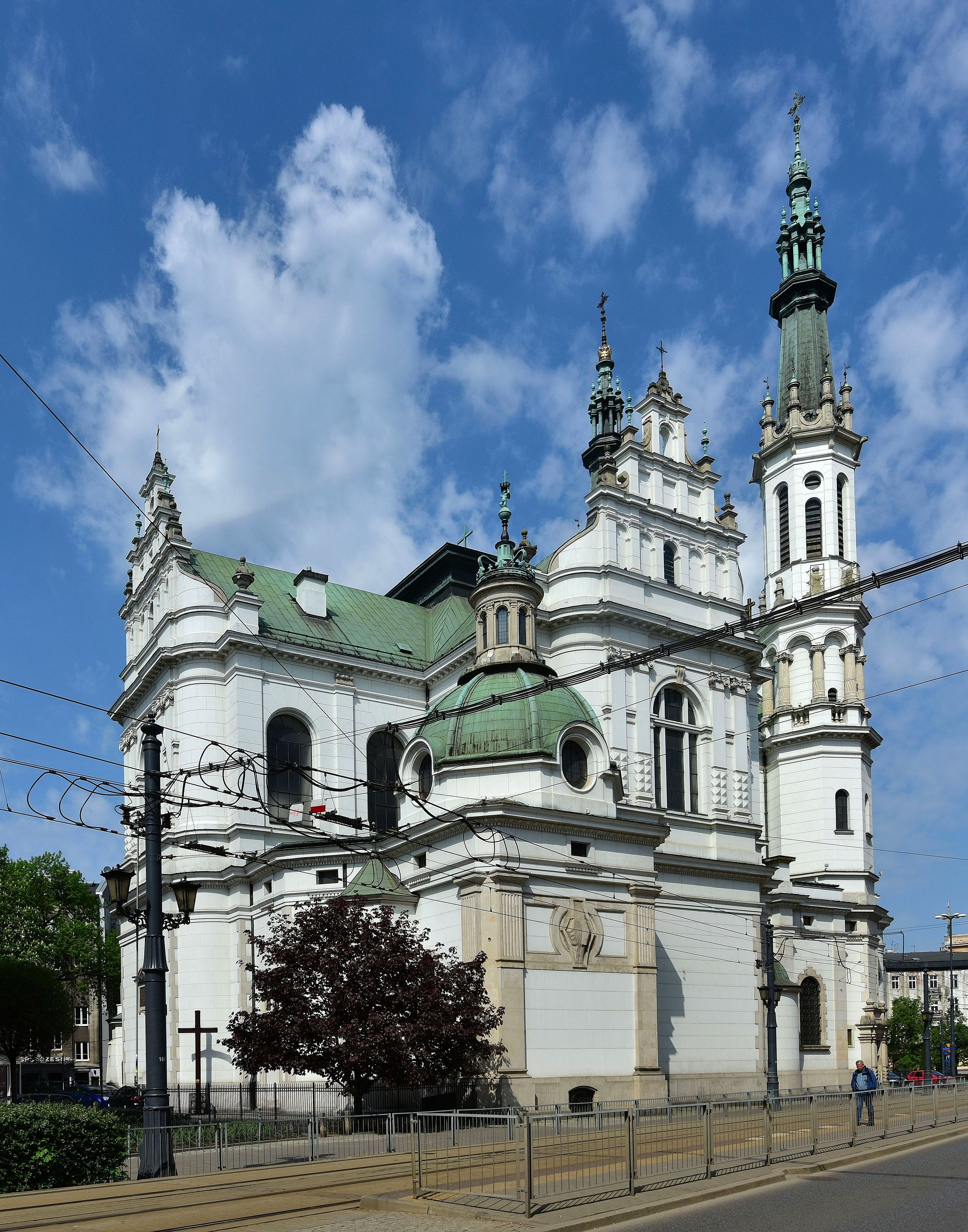 Kościół Najświętszego Zbawiciela w Warszawie, widok od strony ul. Marszałkowskiej